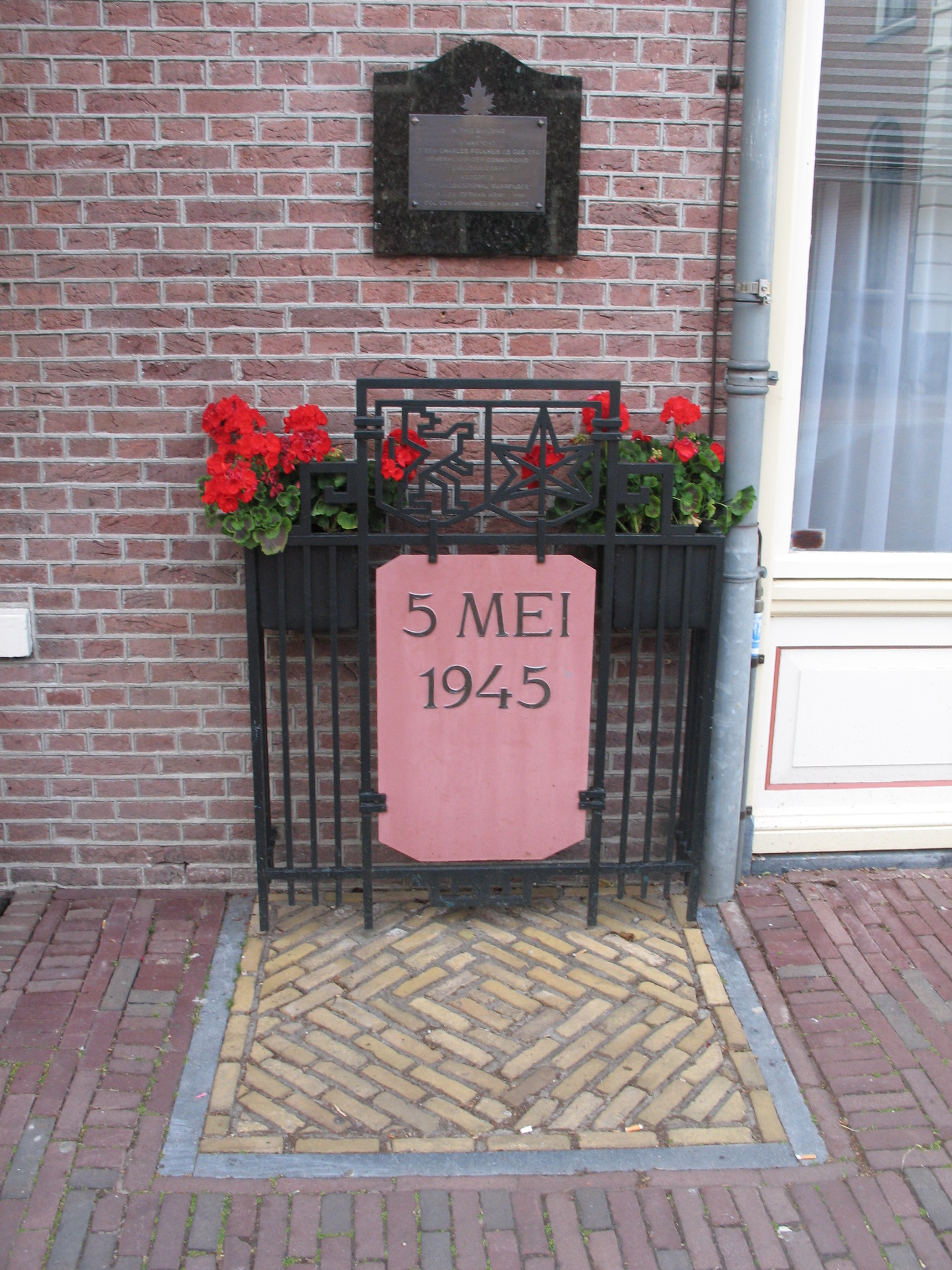 Monument 5 mei Wageningen aan het 5 Meiplein